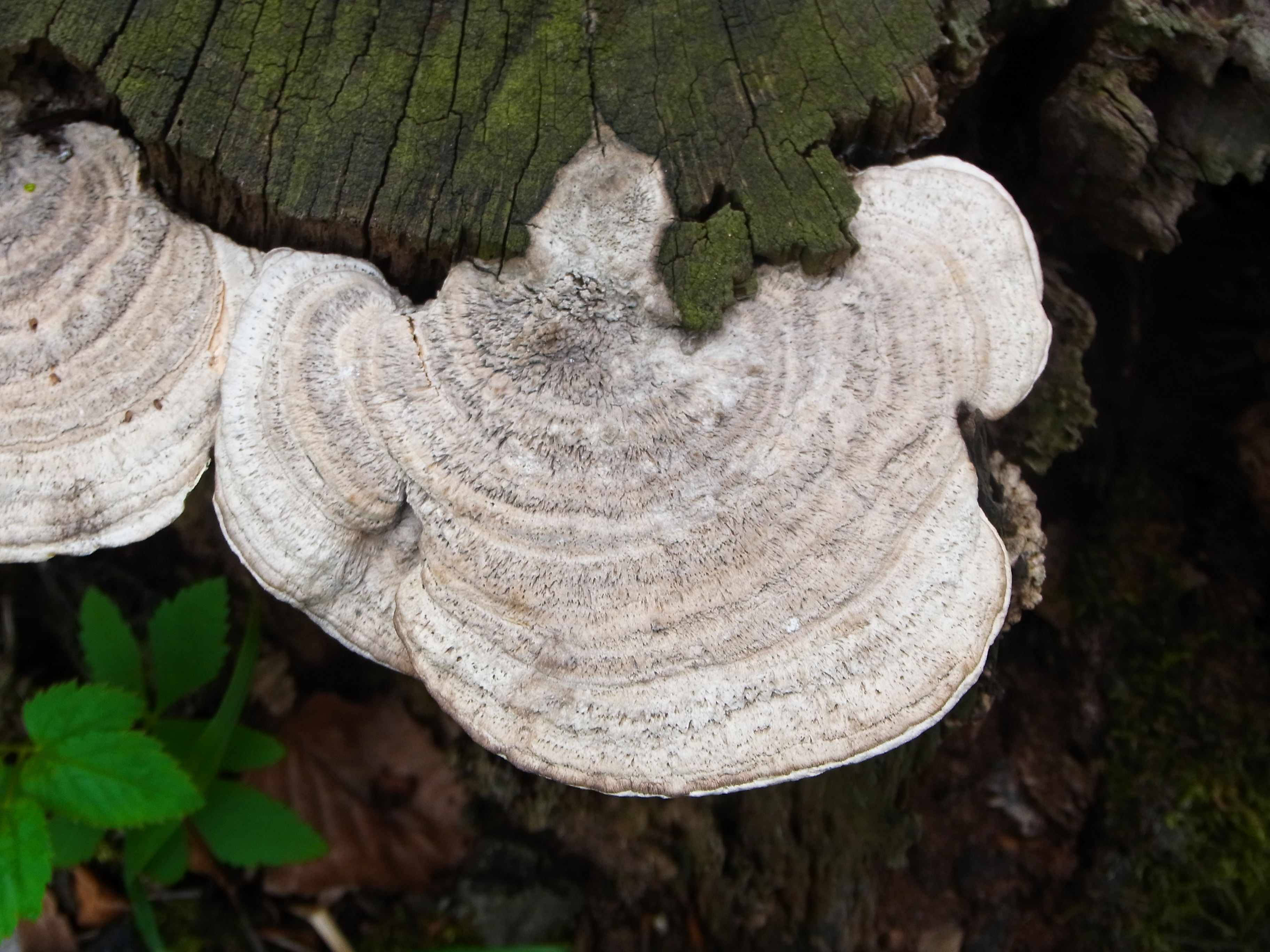 Daedalea quercina